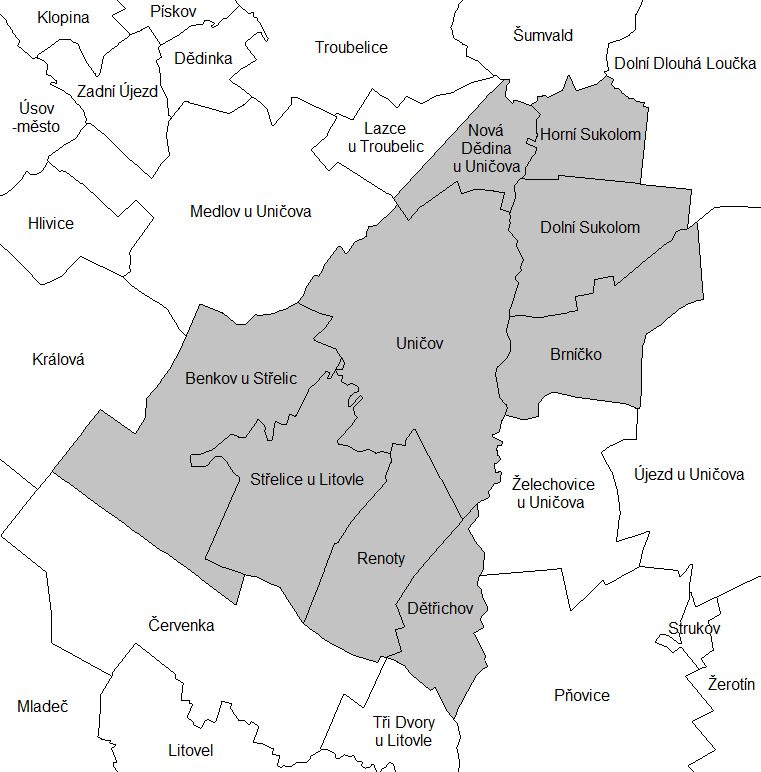 Katastrální mapa Uničova a okolí